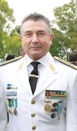 Néstor Roncaglia